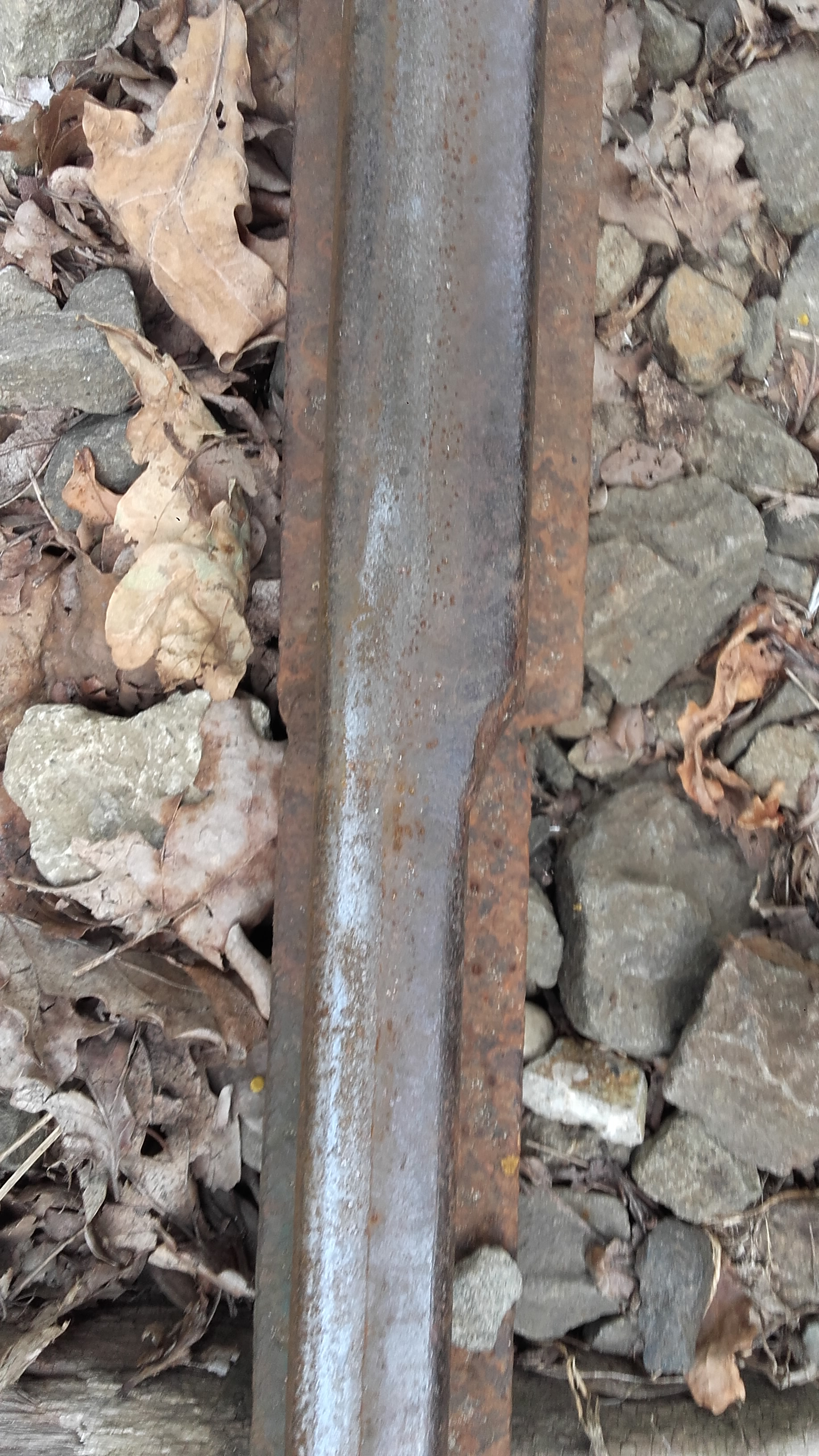 A pályában az egyik sínhegesztés egy 7 kg/fm és egy 9 kg/fm rendszerű sínszálakkal